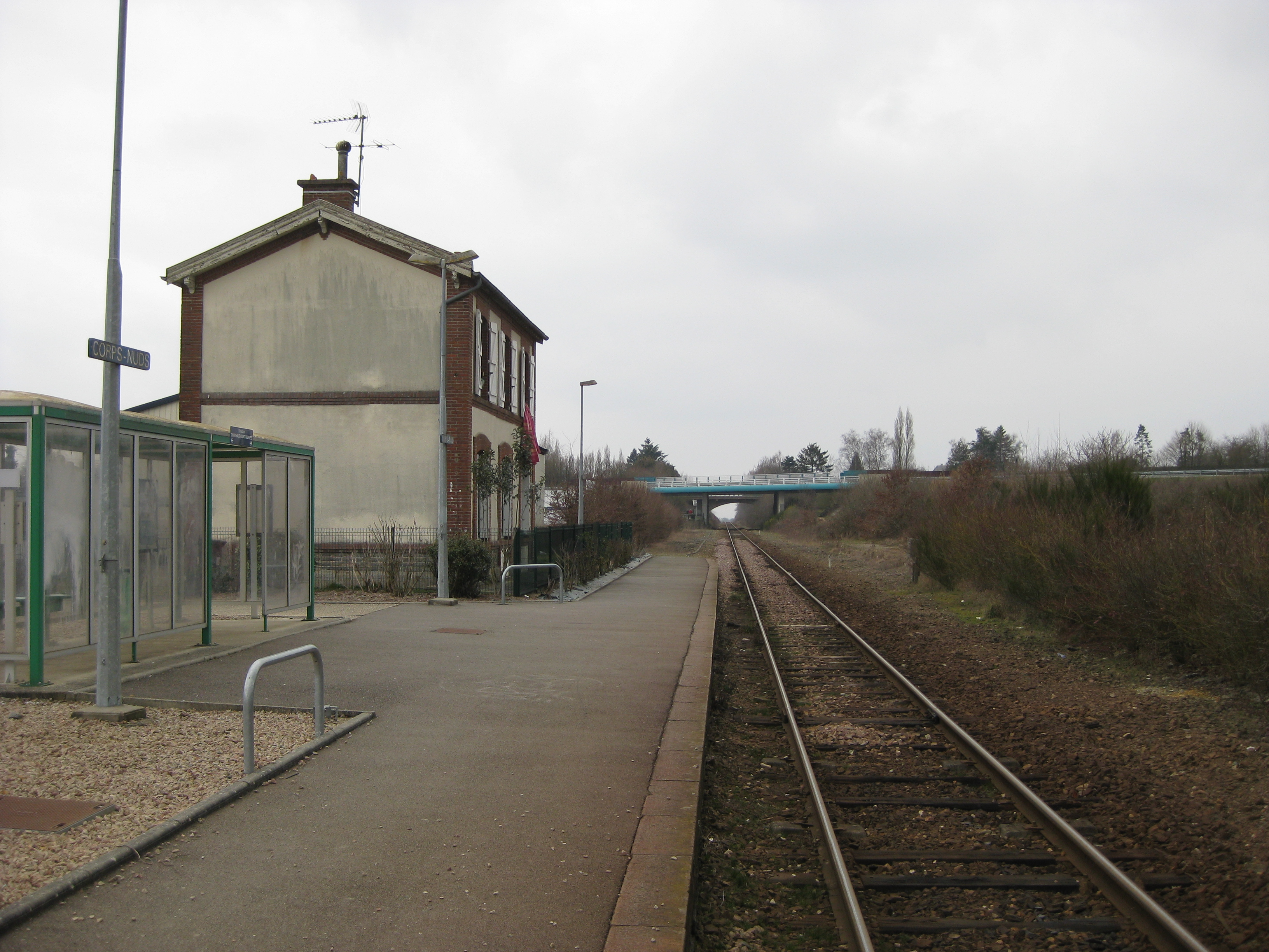 Gare SNCF de Corps-Nuds